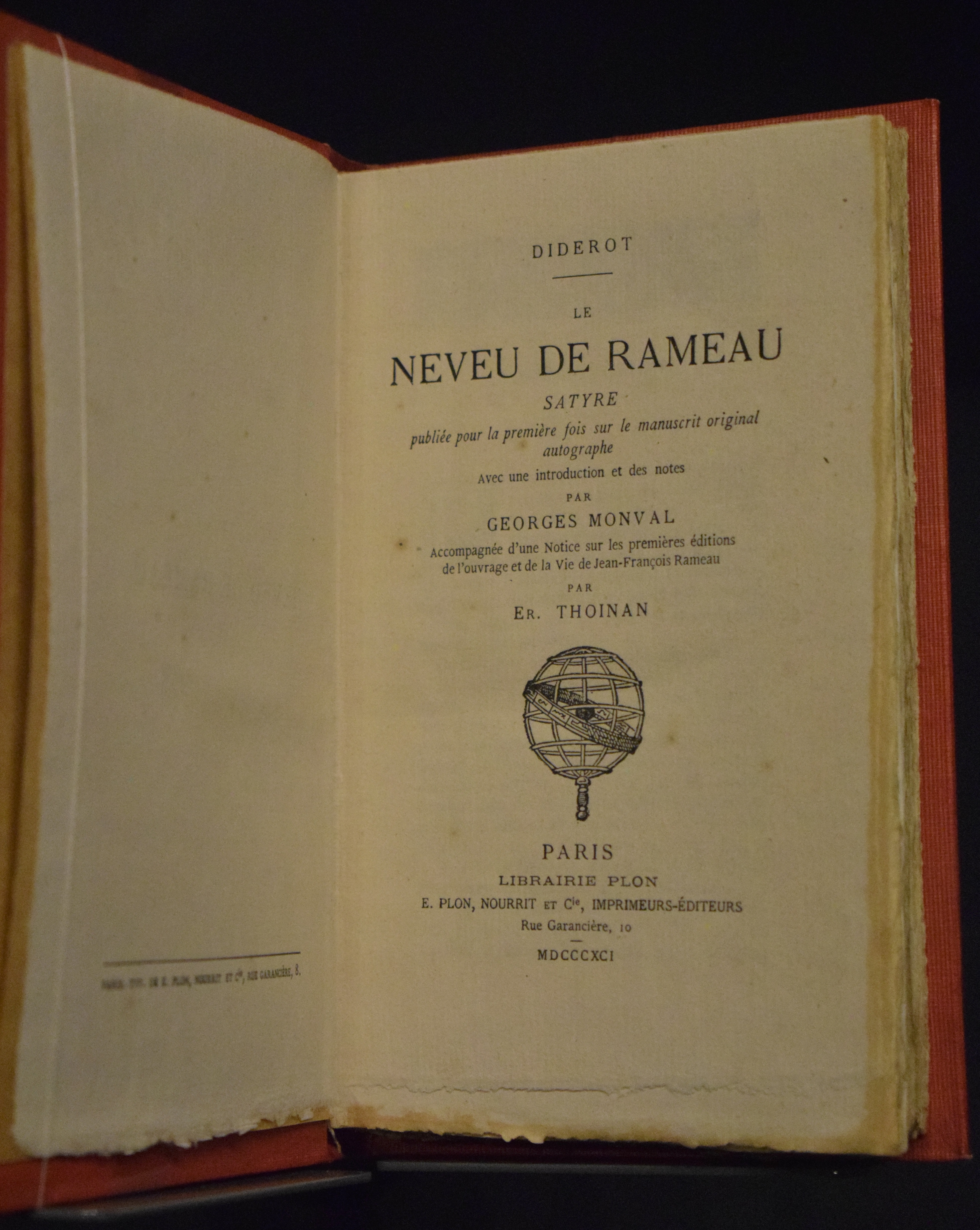 Denis Diderot (1713-1784) « Le Neveu de Rameau » Paris, 1891, édition originale Fondation Martin Bodmer (Suisse)